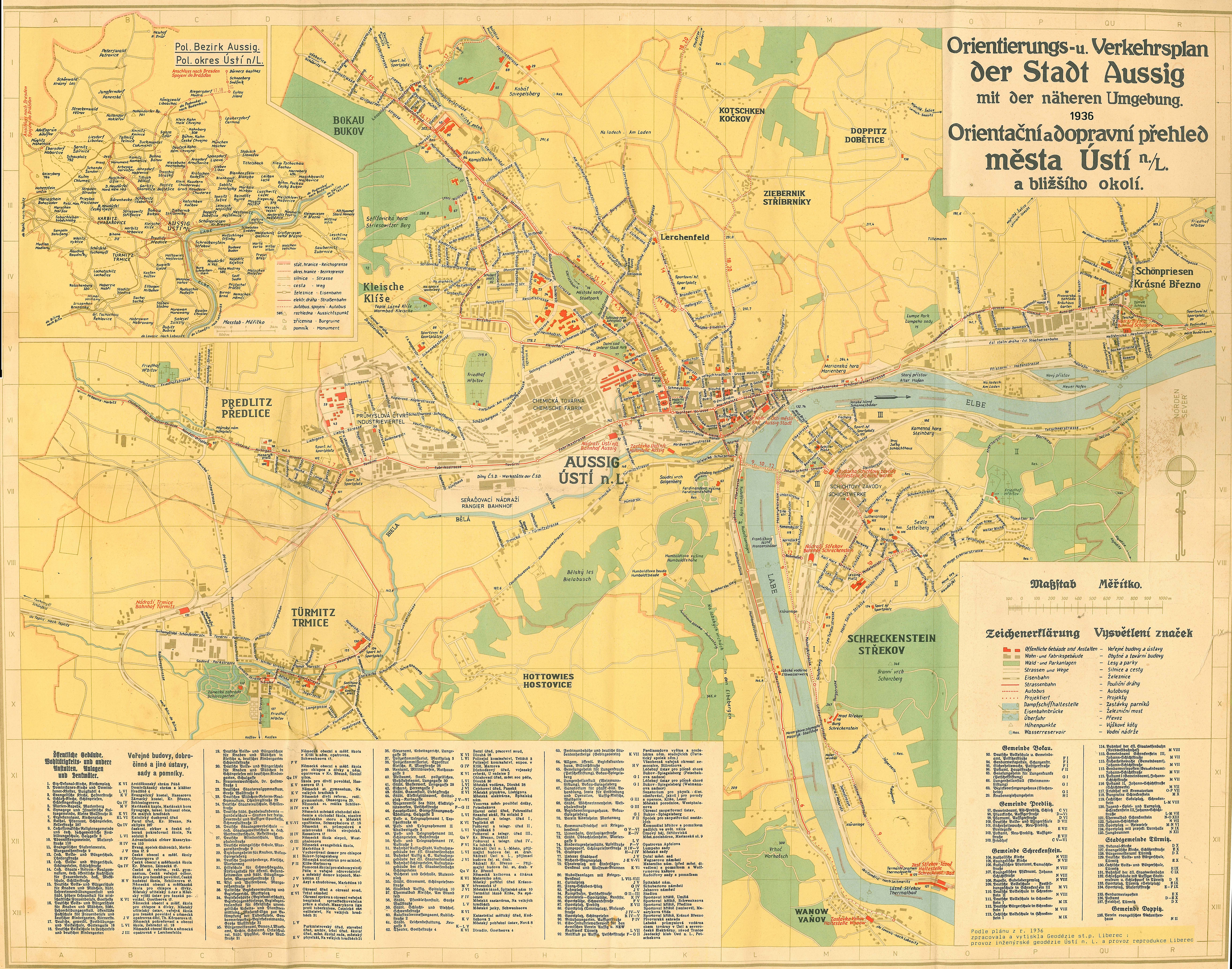 Aussig 1936 Stadtplan Ústí n.L. 1936 Plán města